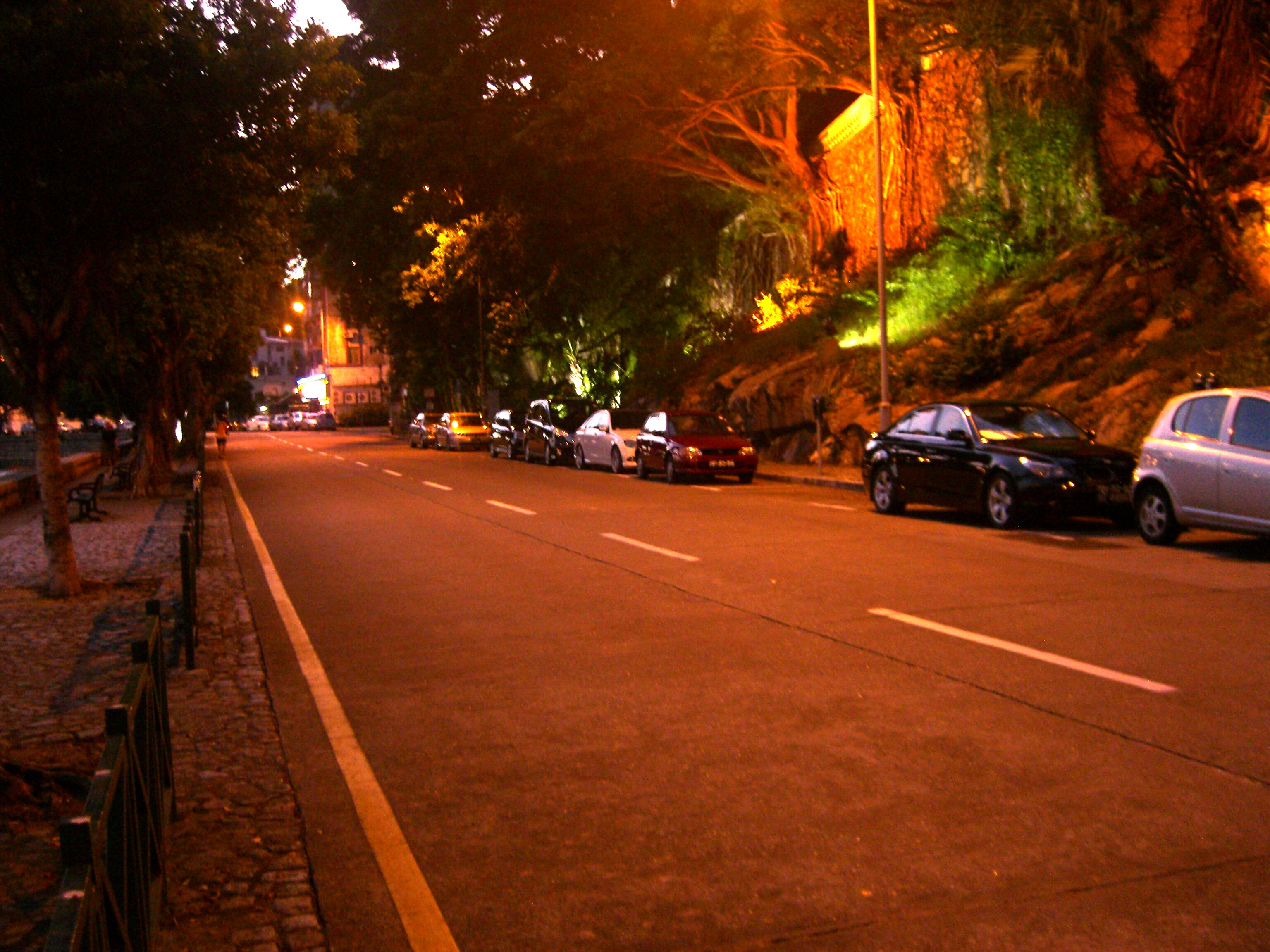 民國大馬路